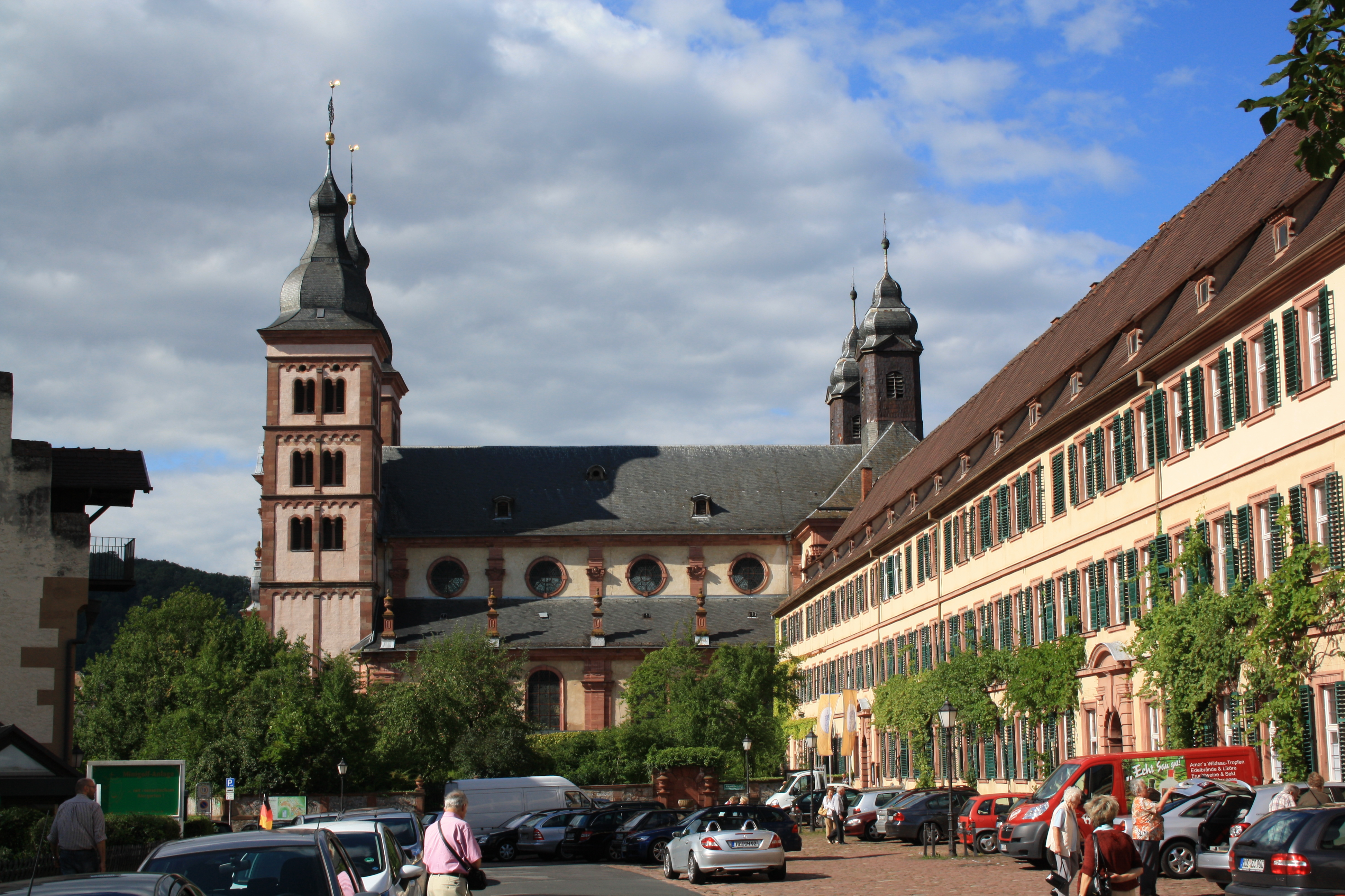 Abteikirche in Amorbach